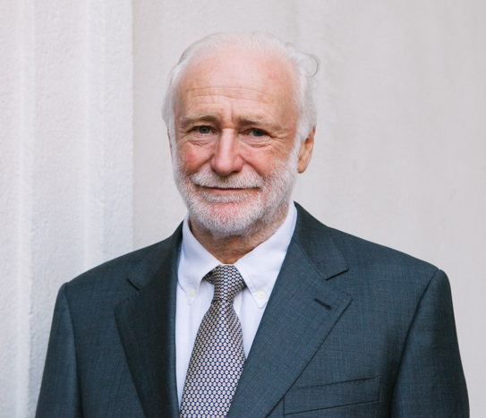 Manuel Riesco, ingeniero chileno.